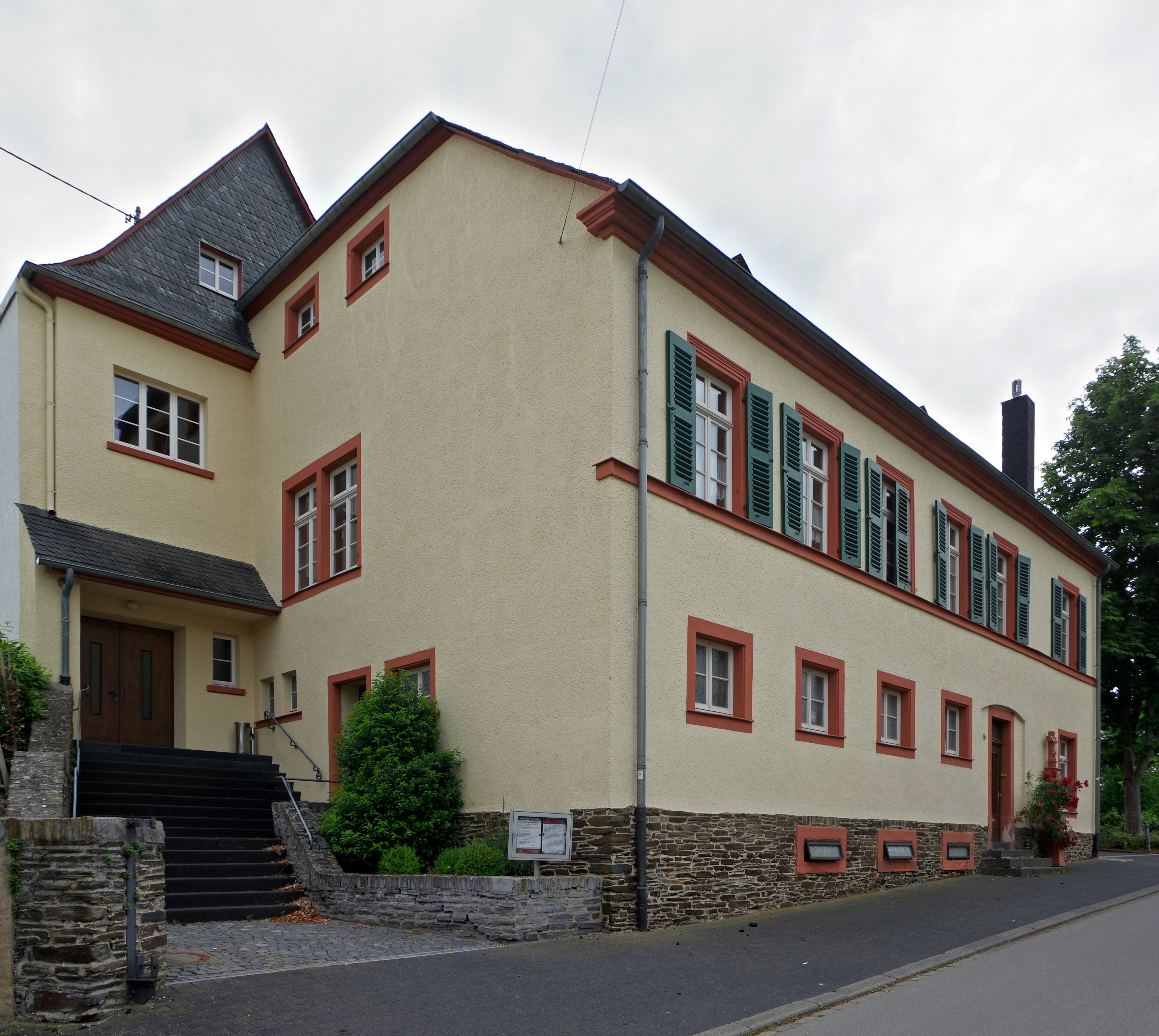 Lösnich, Hauptstr. 16